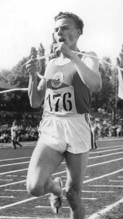 Siegfried Herrmann Zentralbild Wlocka Bey-Qu. 24.7.1956 DDR-Leichtathletik-Meisterschaften in Erfurt. In der Zeit vom 20. bis zum 22. Juli 1956 wurden im Erfurter Georgi-Dimitroff-Stadion die VII. Leichtathletik-Meisterschaften der DDR ausgetragen. UBz: Nach seinem deutschen Rekordlauf über 1 500 m siegte Siegfried Herrmann (Chemie Halle-Leuna) auch über 5.000 m überlegen in 14:14,6 Min. Herrmann passiert das Ziel.